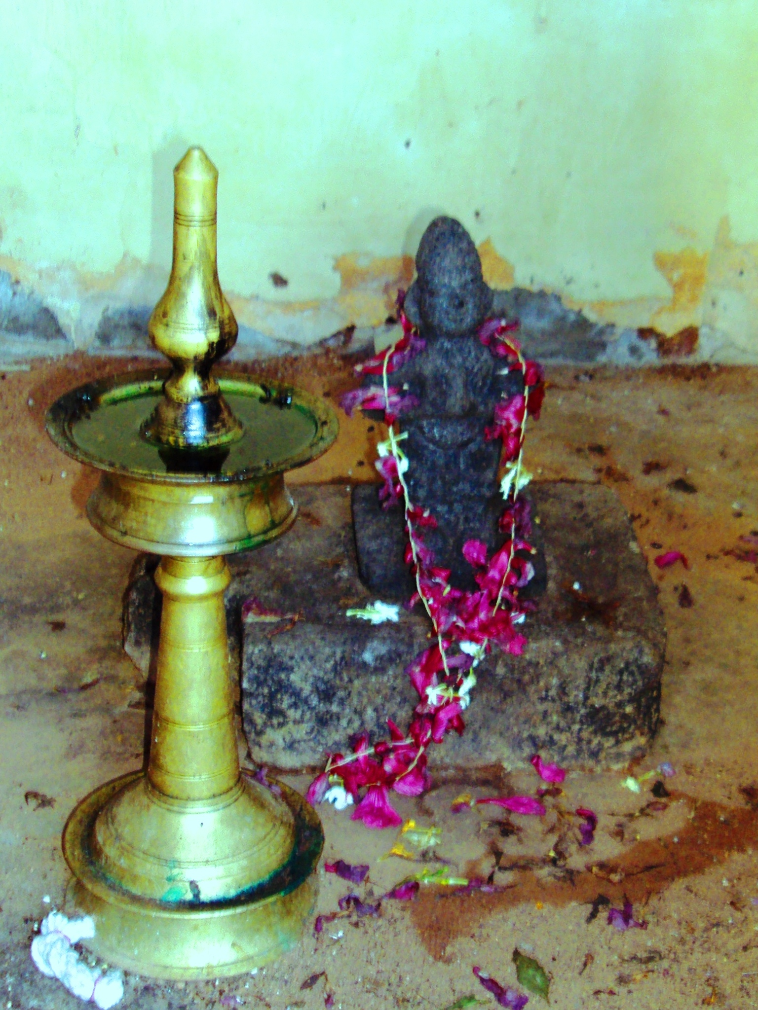 വാഴപ്പള്ളി ക്ഷേത്രത്തിലെ ചങ്ങഴിമുറ്റം ഉണ്ണിയുടെ പ്രതിഷ്ഠ